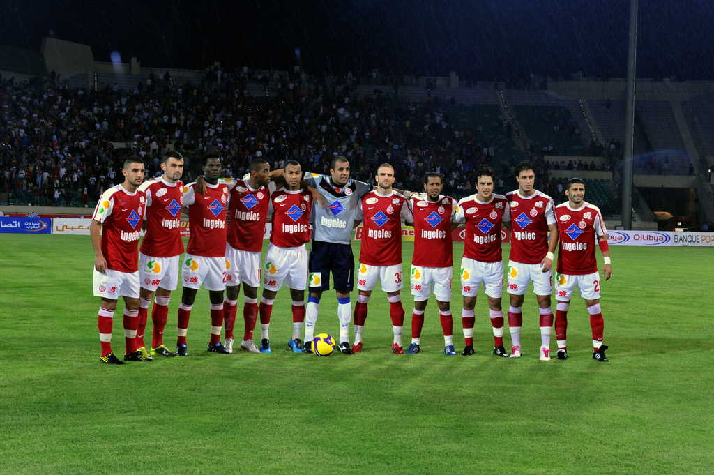 Équipe du WAC saison 2010-2011